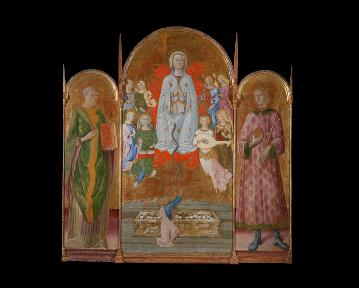 from Murlo (Siena) Capella of La Befa.